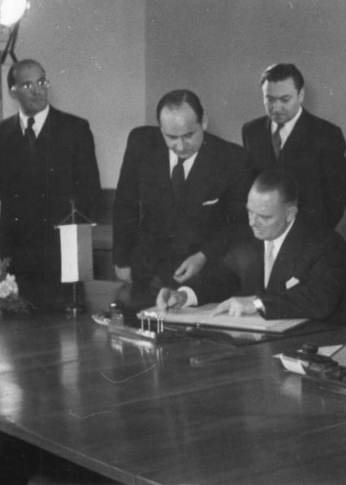 Zentralbild-Heilig, 28.11.1950, Feierlicher Austausch der Ratifizierungsurkunden über die Oder-Neisse-Friedensgrenze. Am 28.11.50 fand im Aussenministerium der DDR in Berlin der feierliche Austausch der Ratifizierungsurkunden über das Abkommen zwischen der Polnische Volksrepublik und der DDR über die Oder-Neisse-Friedensgrenze statt. UBz.: Sitzend: der polnische Botschafter Izydorczyk.